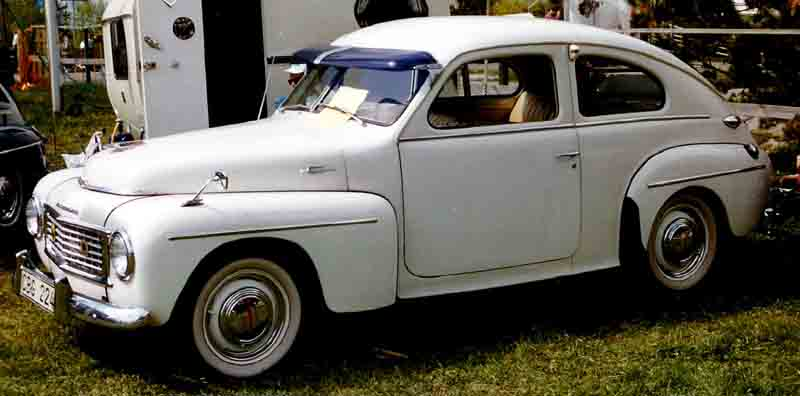 Volvo PV444 KS Sedan 1956